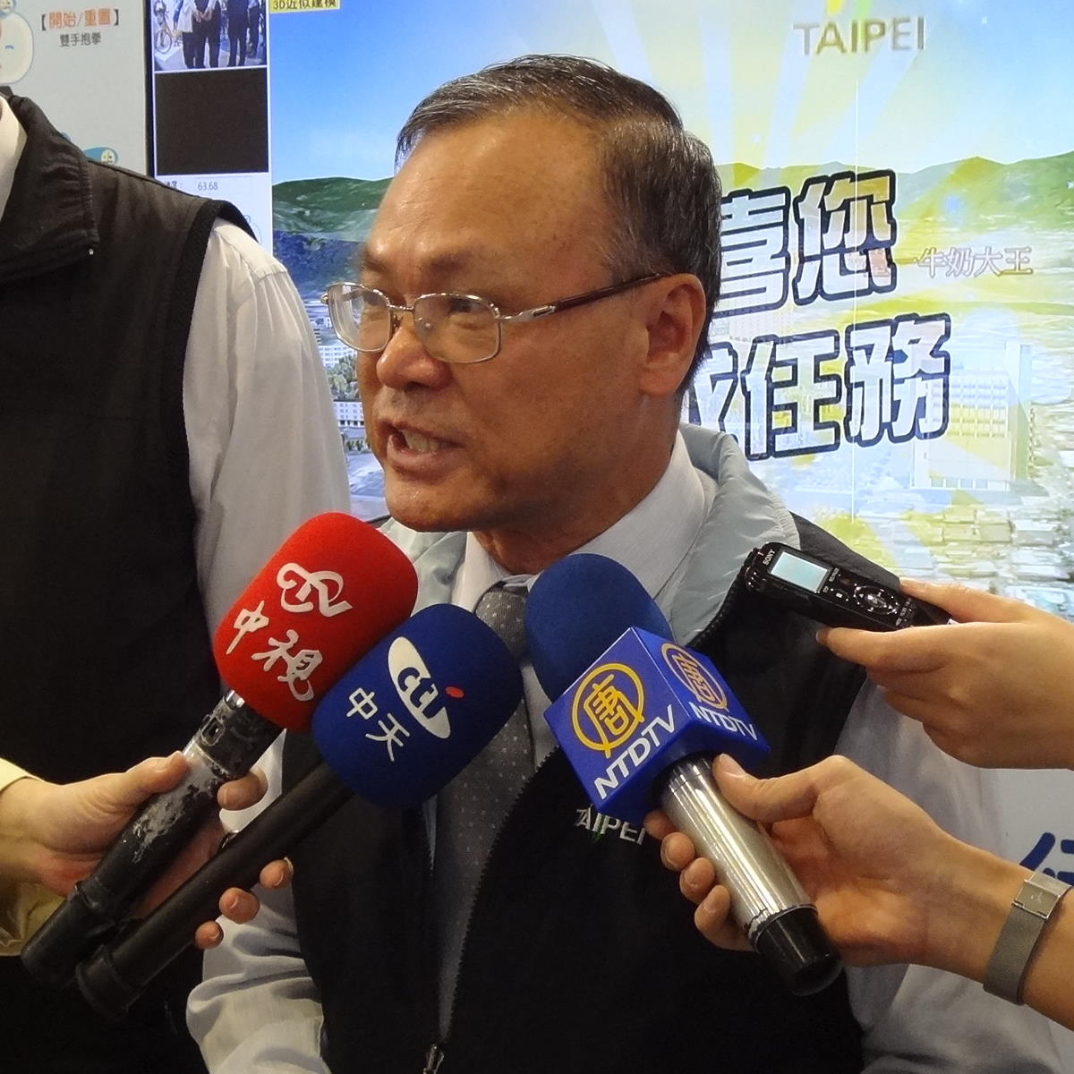 2013年臺北資訊月，中視新聞、中天新聞、新唐人亞太電視台訪問臺北市政府資訊局局長詹德存。